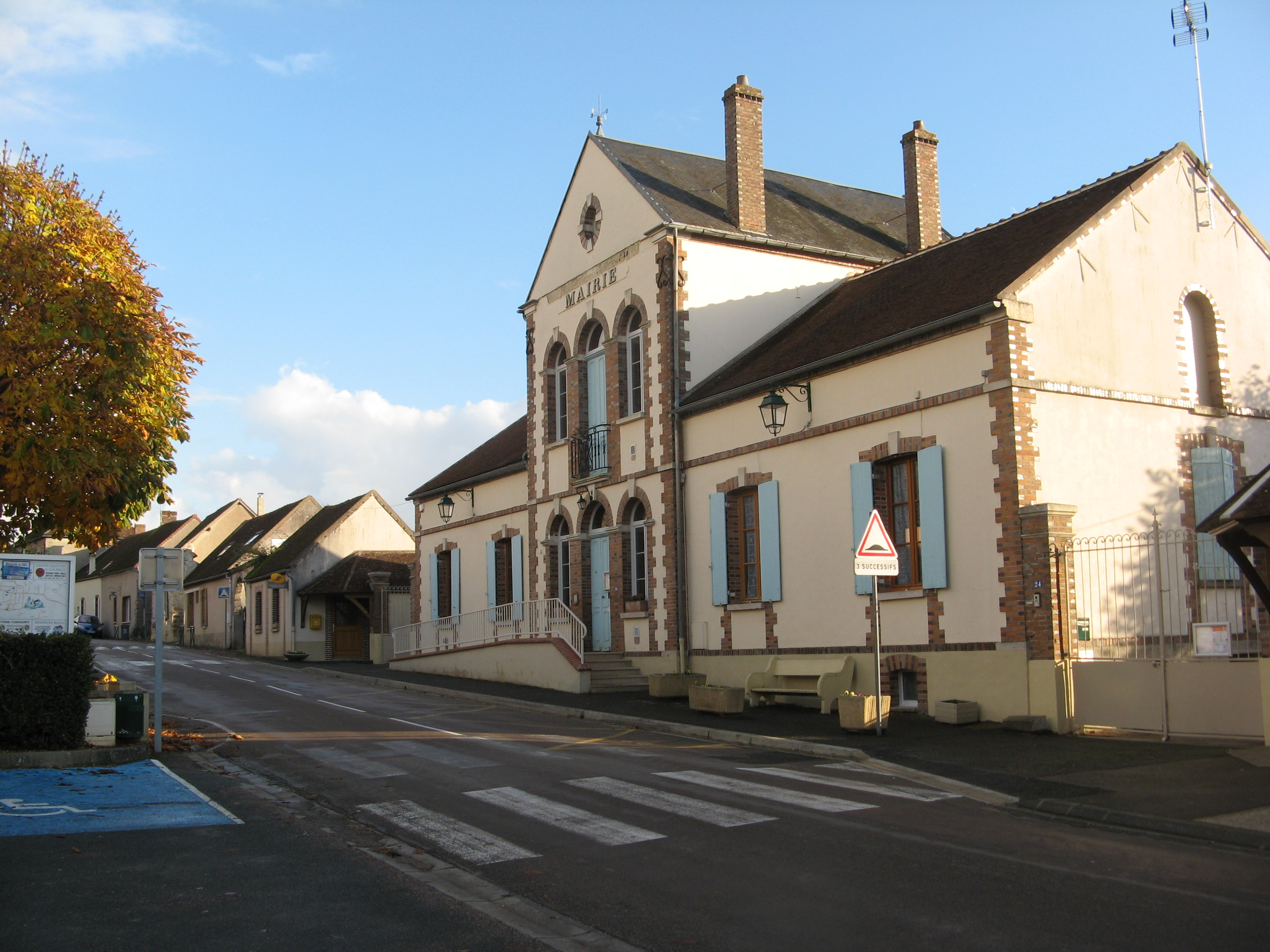 Voisines : mairie